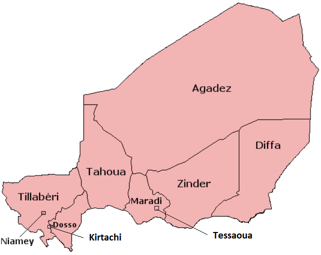 Carte du Niger avec les villes de Niamey, Tessaoua et Kirtachi